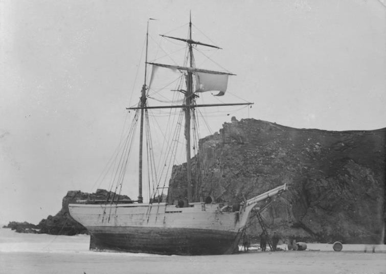 Grána á strandstað við eyjuna Ljóðhús (Ytri-Suðureyjar) árið 1896. Ljósmyndara er ekki getið.